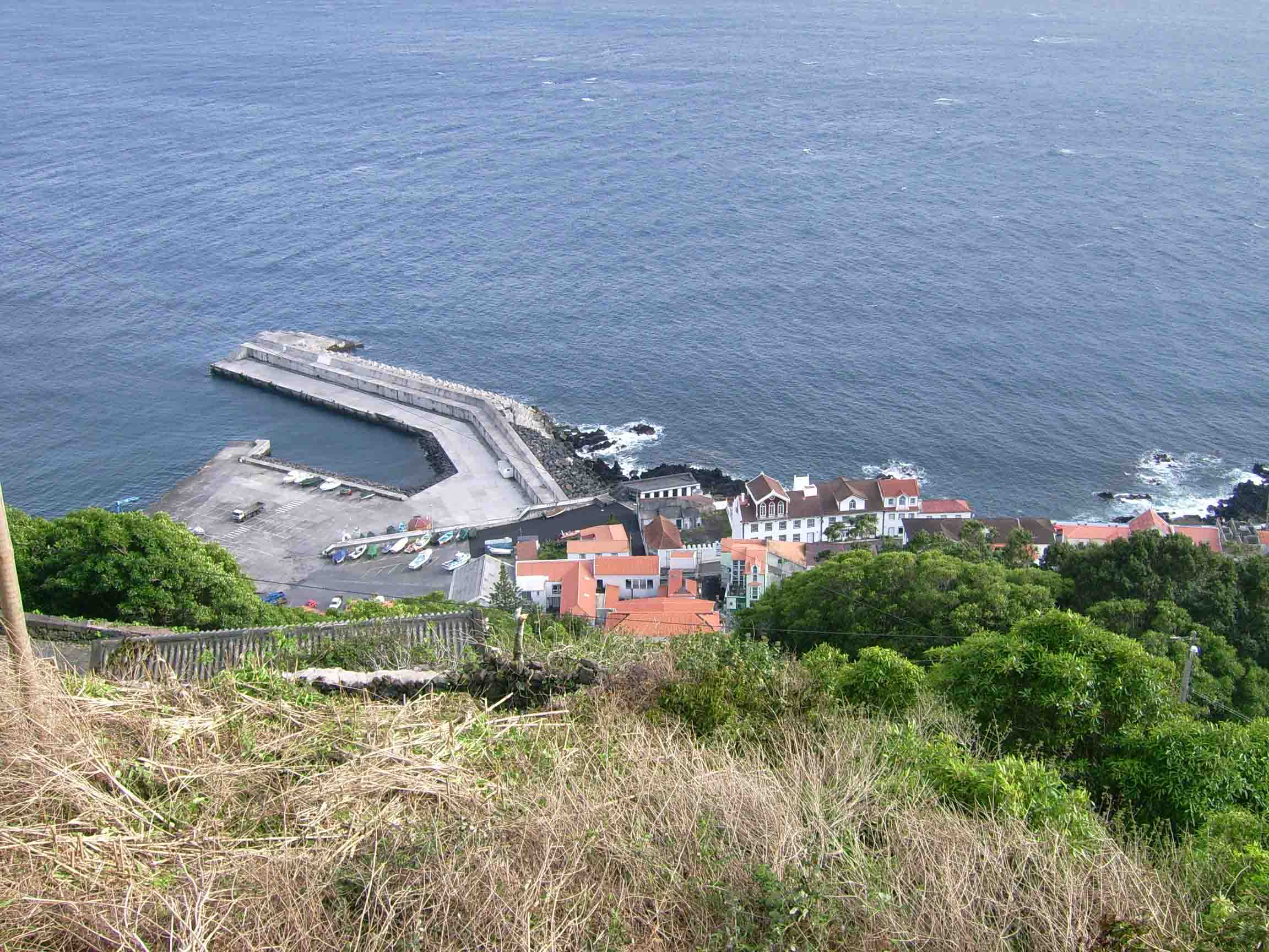 Vista parcial do Porto da Calheta, ilha de São Jorge, Açores, Portugal